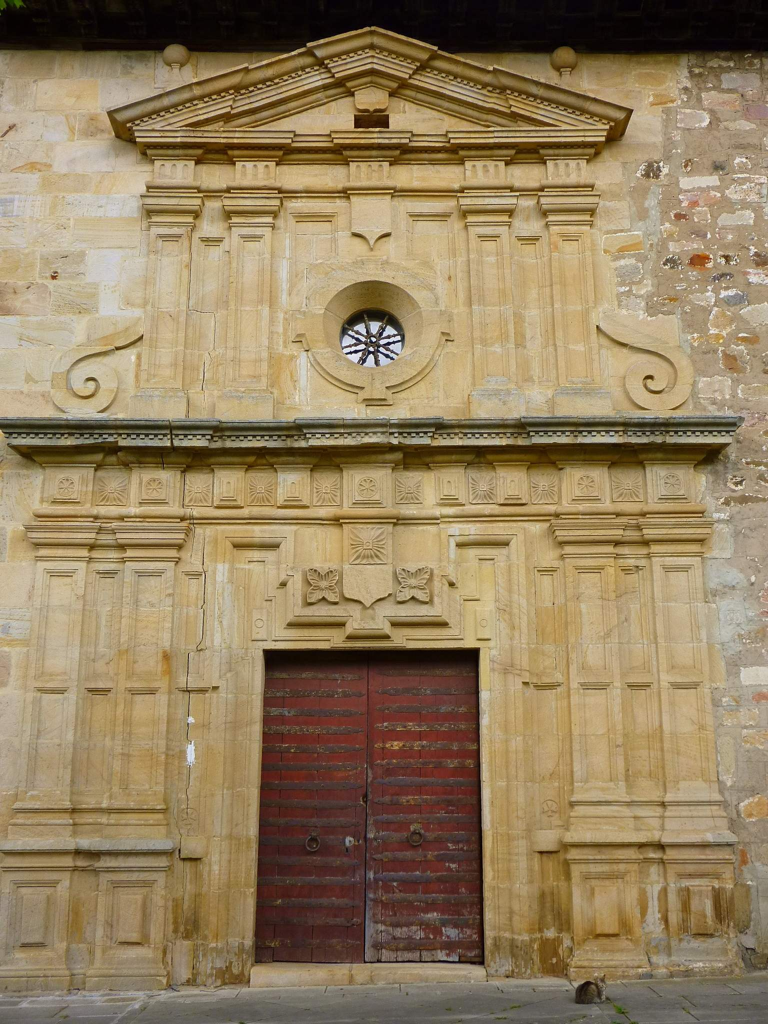 Santuario de Santa María de Dorleta, en Salinas de Léniz (Leintz-Gatzaga), Gipuzkoa